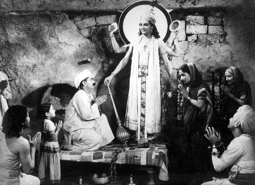 V. Shantaram sous les traits de Vishnu dans Surekha Haran (1921)